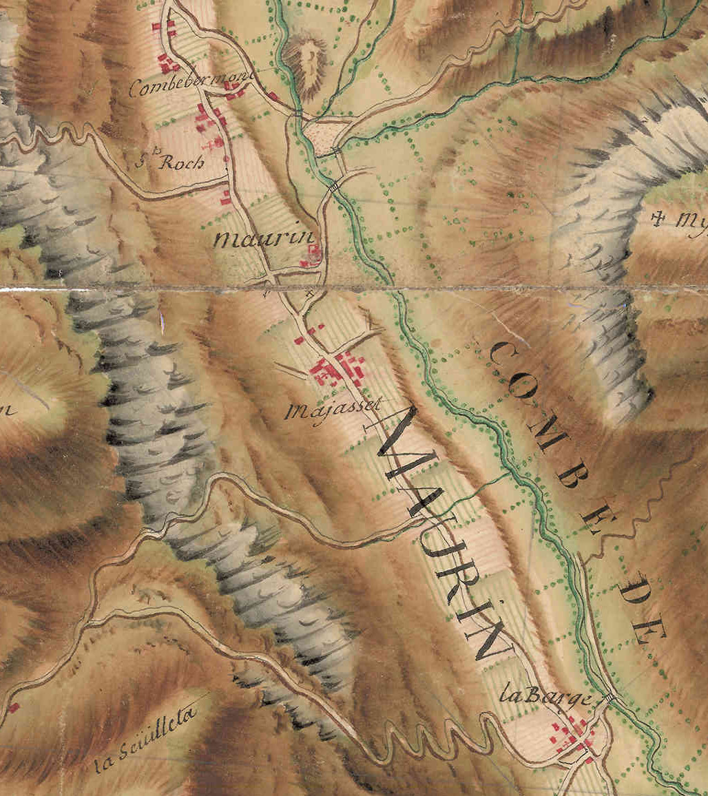 carte de Bourcet numérisé Paris, Nicolas-Alexandre et Olivier-Joseph, Extrait réduc JPG 30% Antoine-H